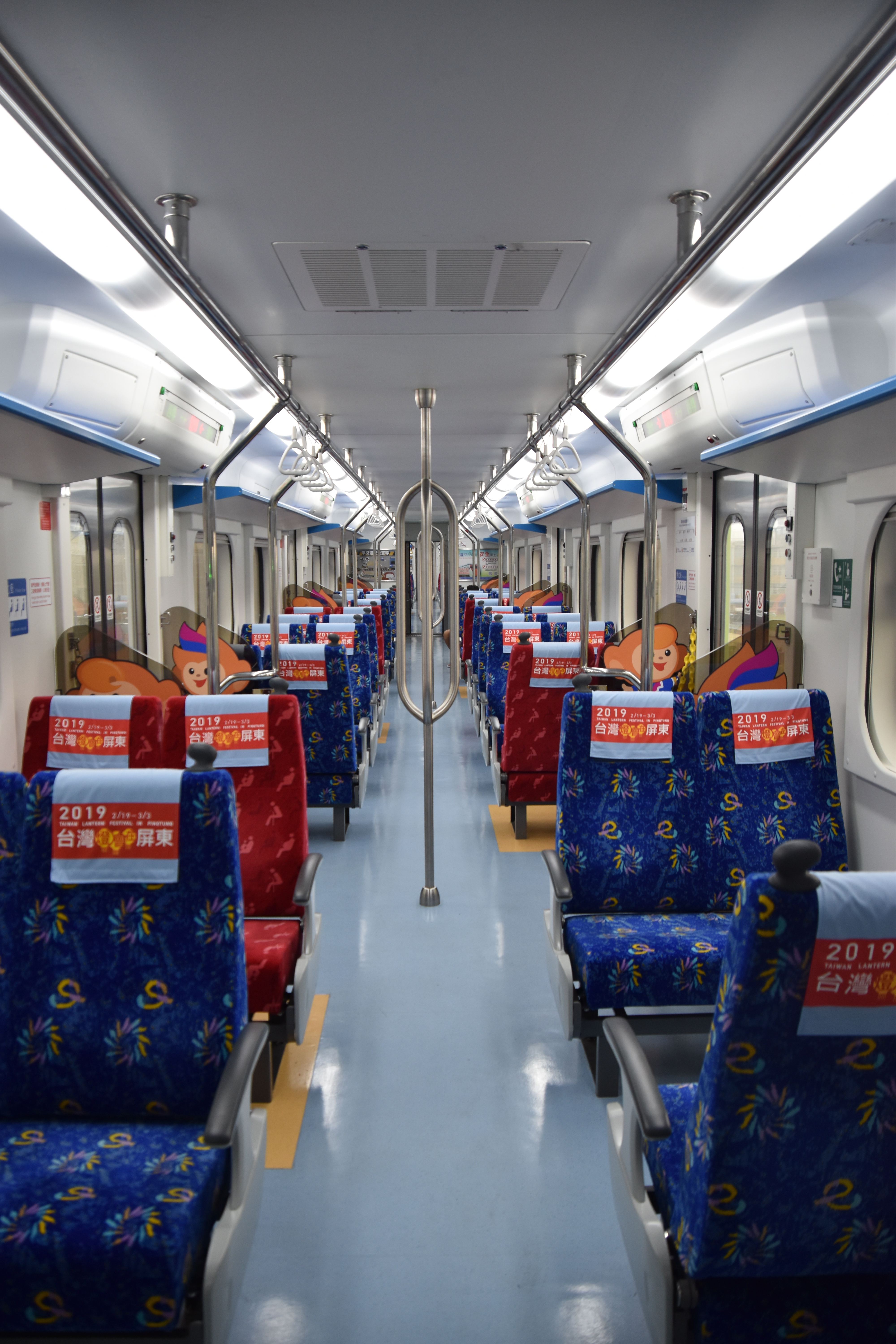 EMU500內裝改造後，於EM車廂增設的大型行李放置區